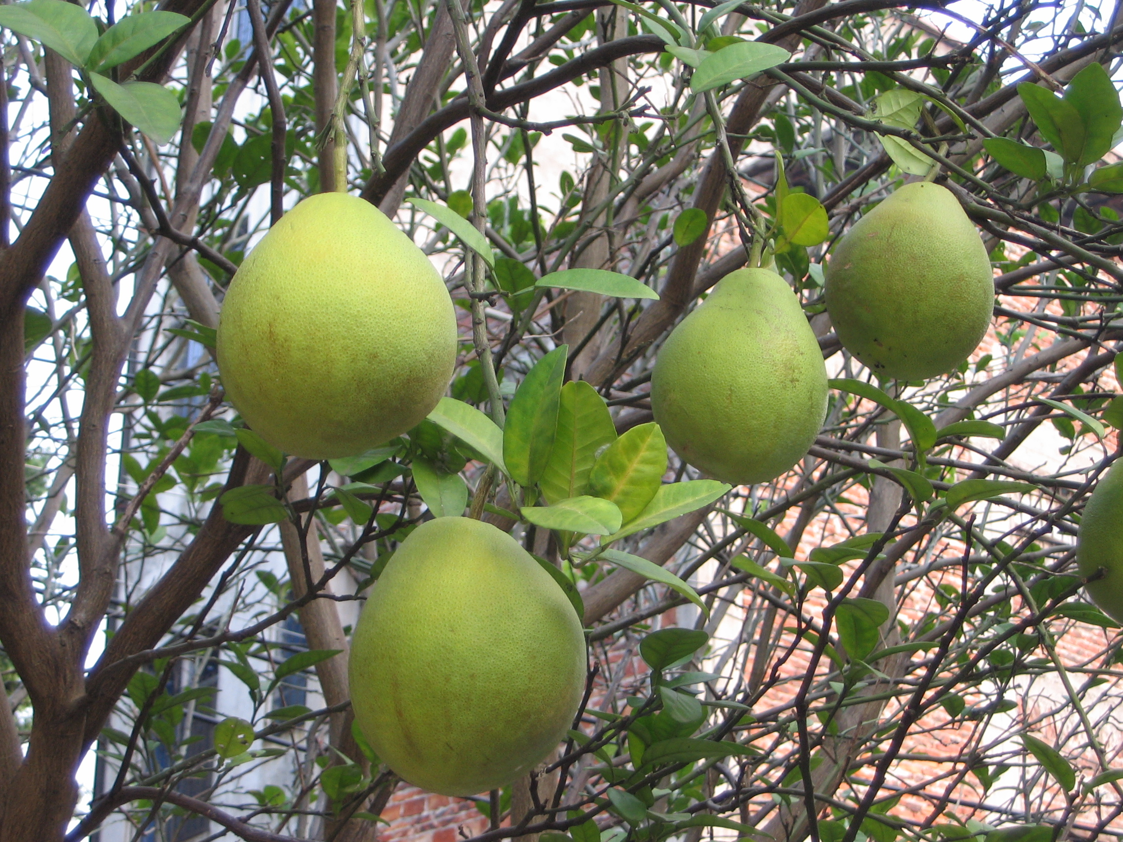 中文（香港）: 樹上的沙田柚